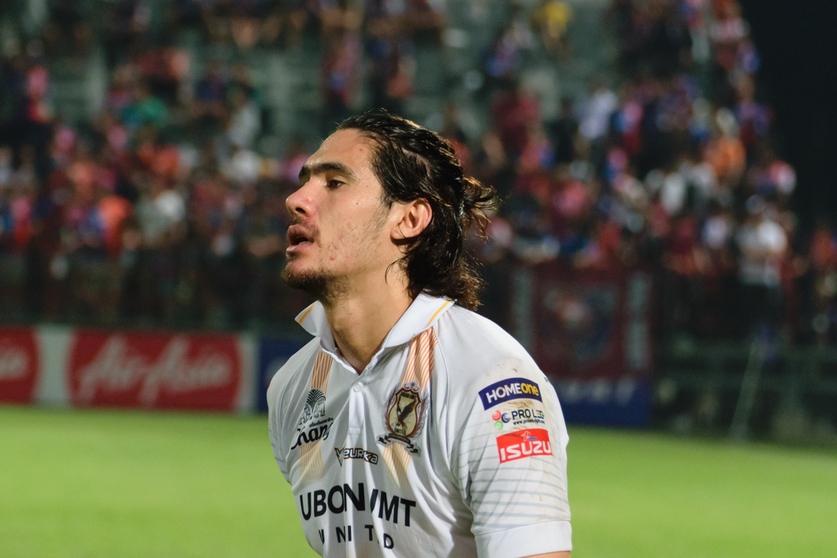 Mark Hartmann